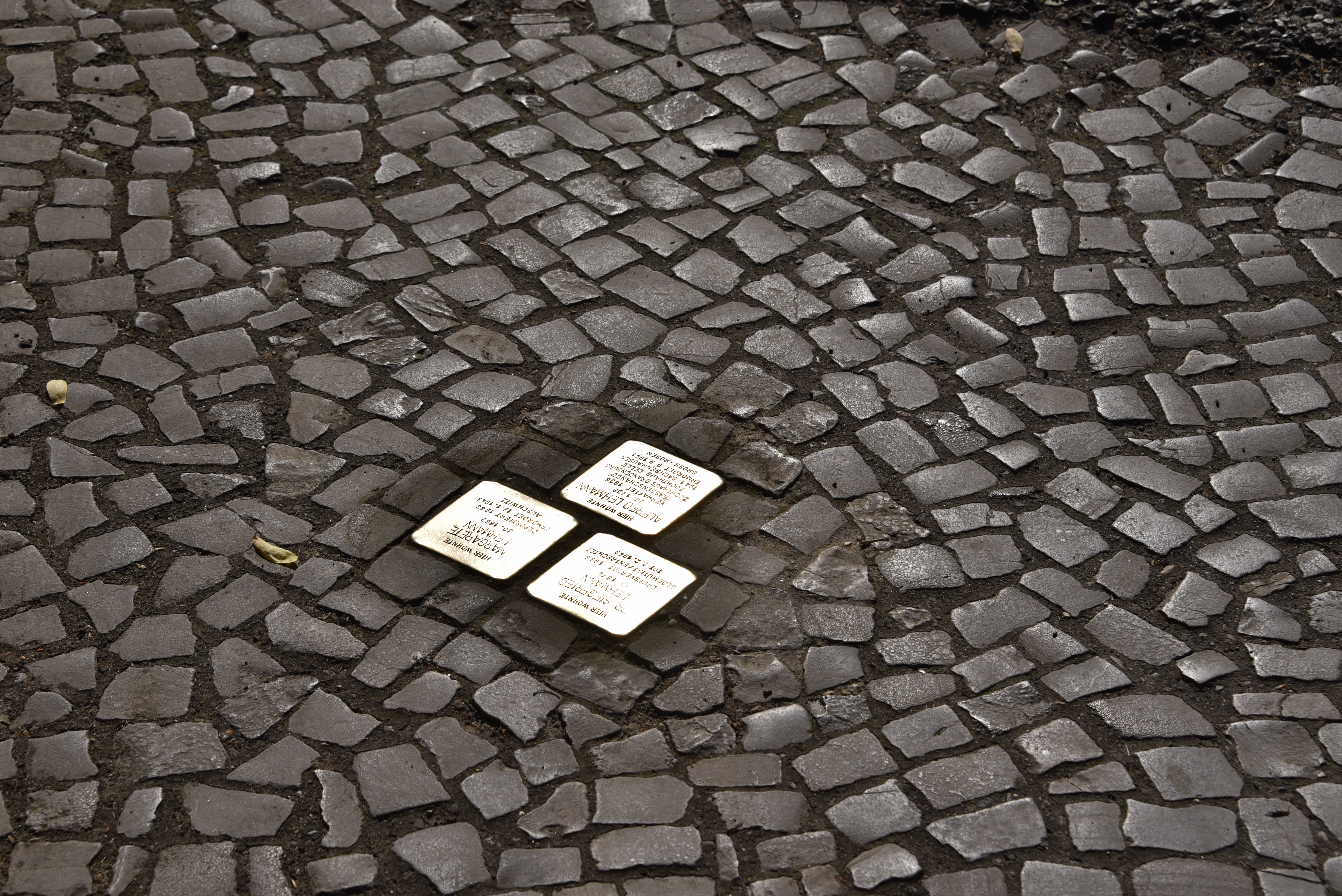 Stolpersteine für Familie Lehmann